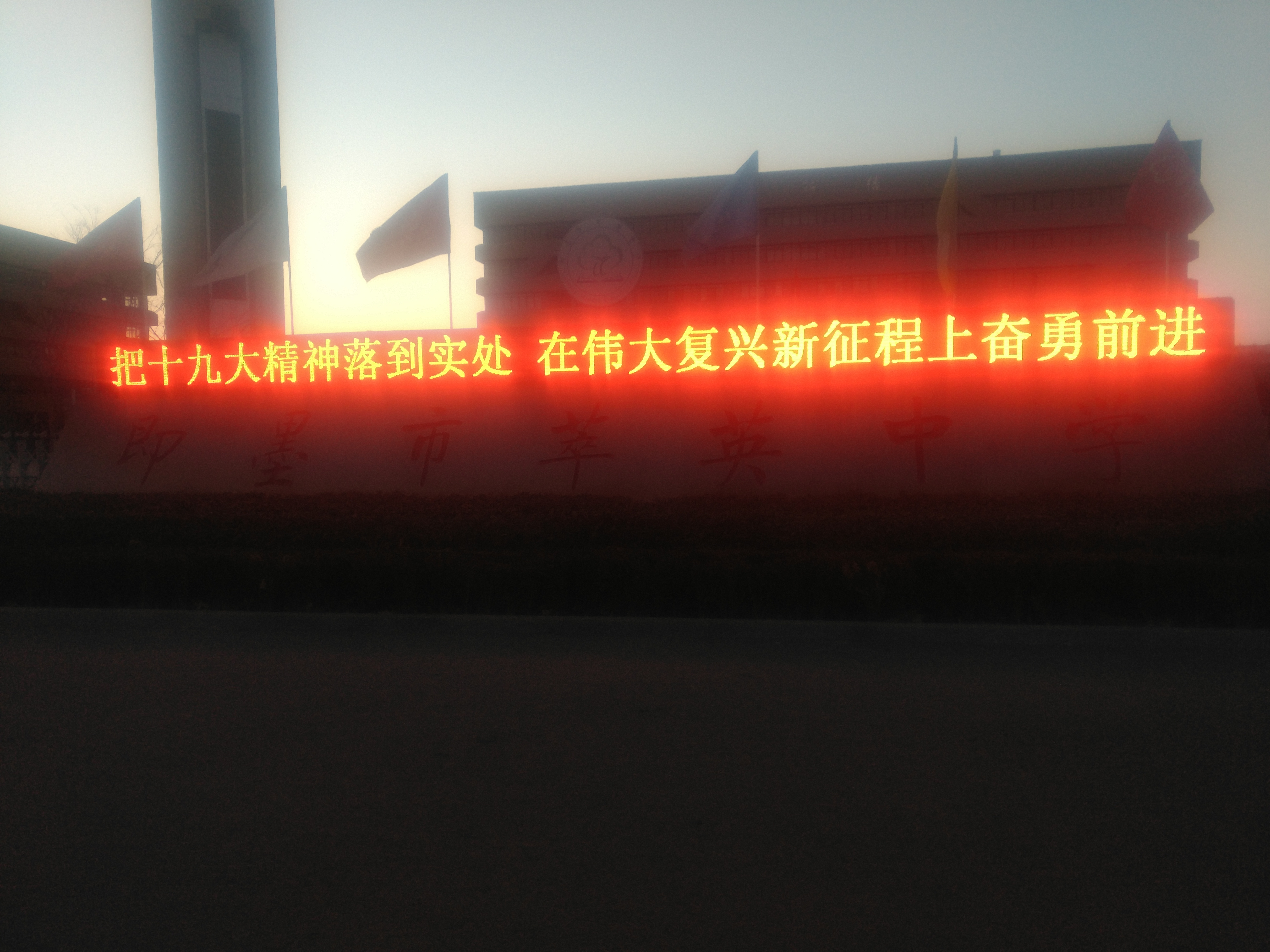 这个文件是即墨市翠英中学的东校门。欢迎大家使用。